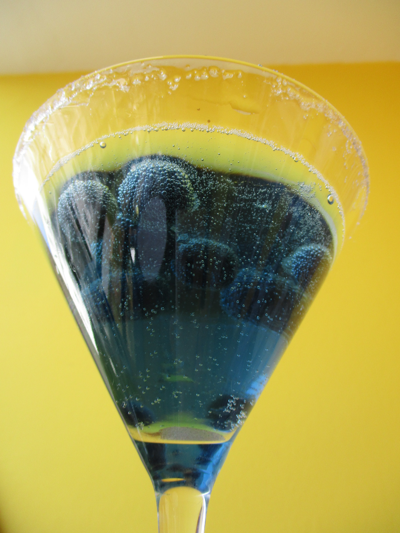 Purple Rain (cocktail)